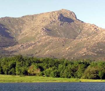 Pico de La Maliciosa, 2.227 metros. Pertenece a la Sierra de Guadarrama, centro de España.